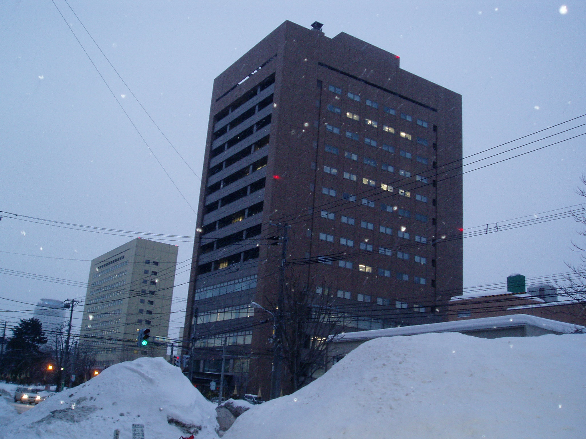 平成十八年二月壱八日 投稿者自身による撮影。手前は図書館等がある基礎医学研究棟、後方が臨床教育研究棟。臨床教育研究棟の南側（写真では基礎医学研究棟に隠れている）に附属病院がある。Category:大学の画像ja:Category:雪画像ja:Category:中央区_(札幌市)の画像